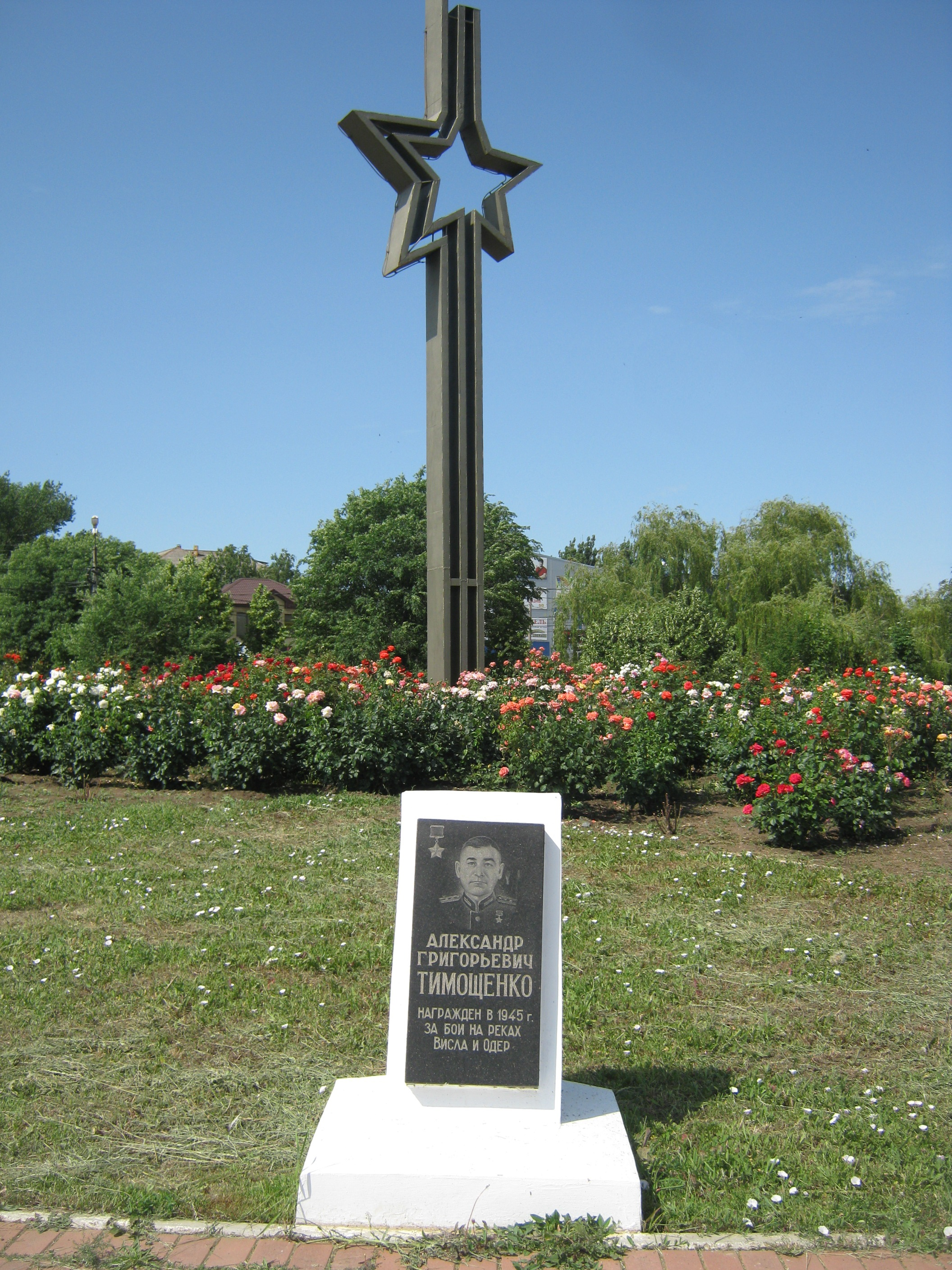 Каменск - Тимощенко 1